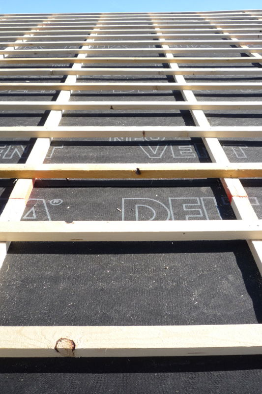 Unterspannbahn mit darüber angebrachter Lattung